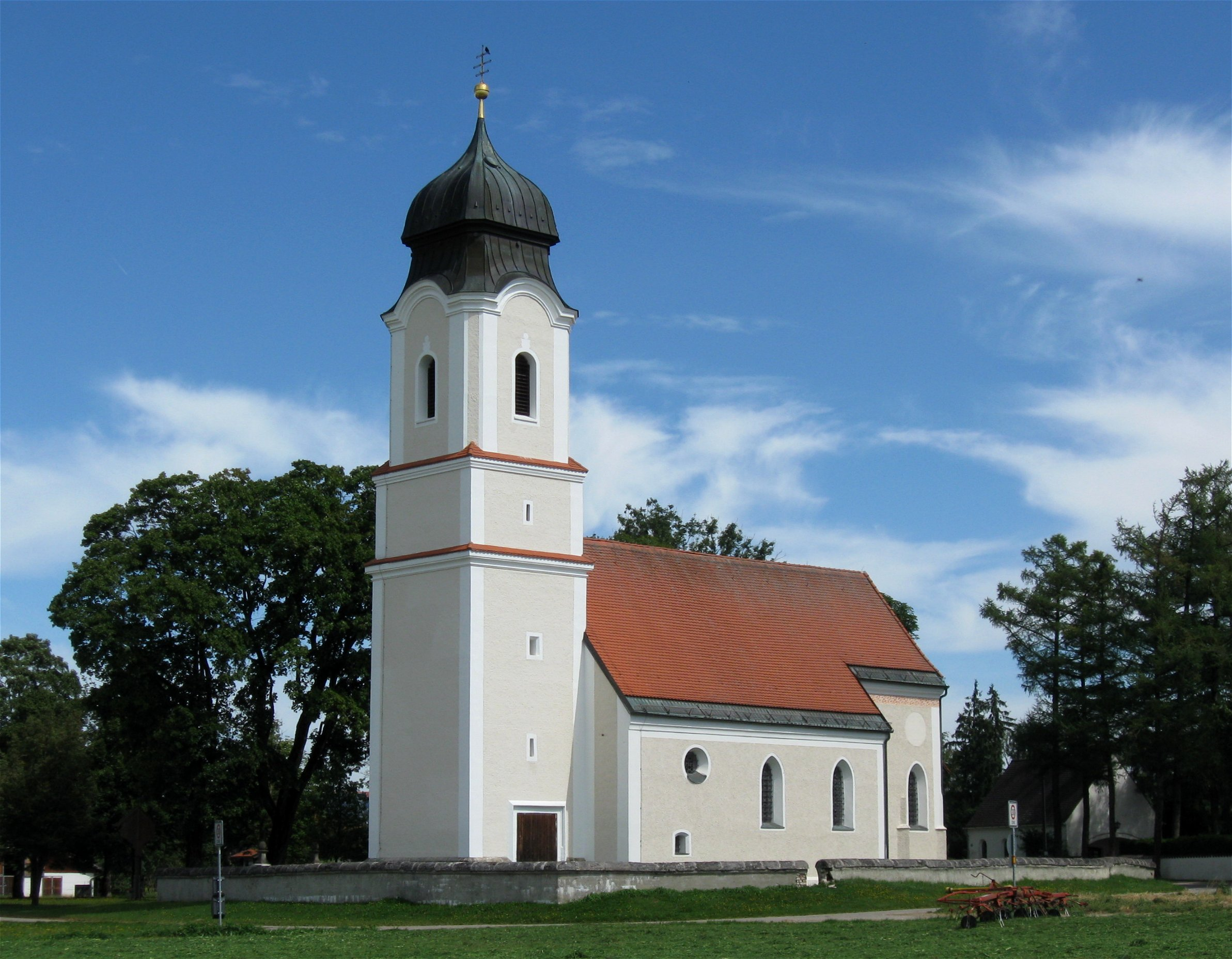 Leonhardistraße 7, Siegertsbrunn; Katholische Wallfahrtskirche St. Leonhard, erbaut 1460, Anbau 1592, Erneuerung 1609. Äußere Erscheinung barock; mit Kirchhofummauerung des 17./18. Jahrhunderts. D-1-84-127-16